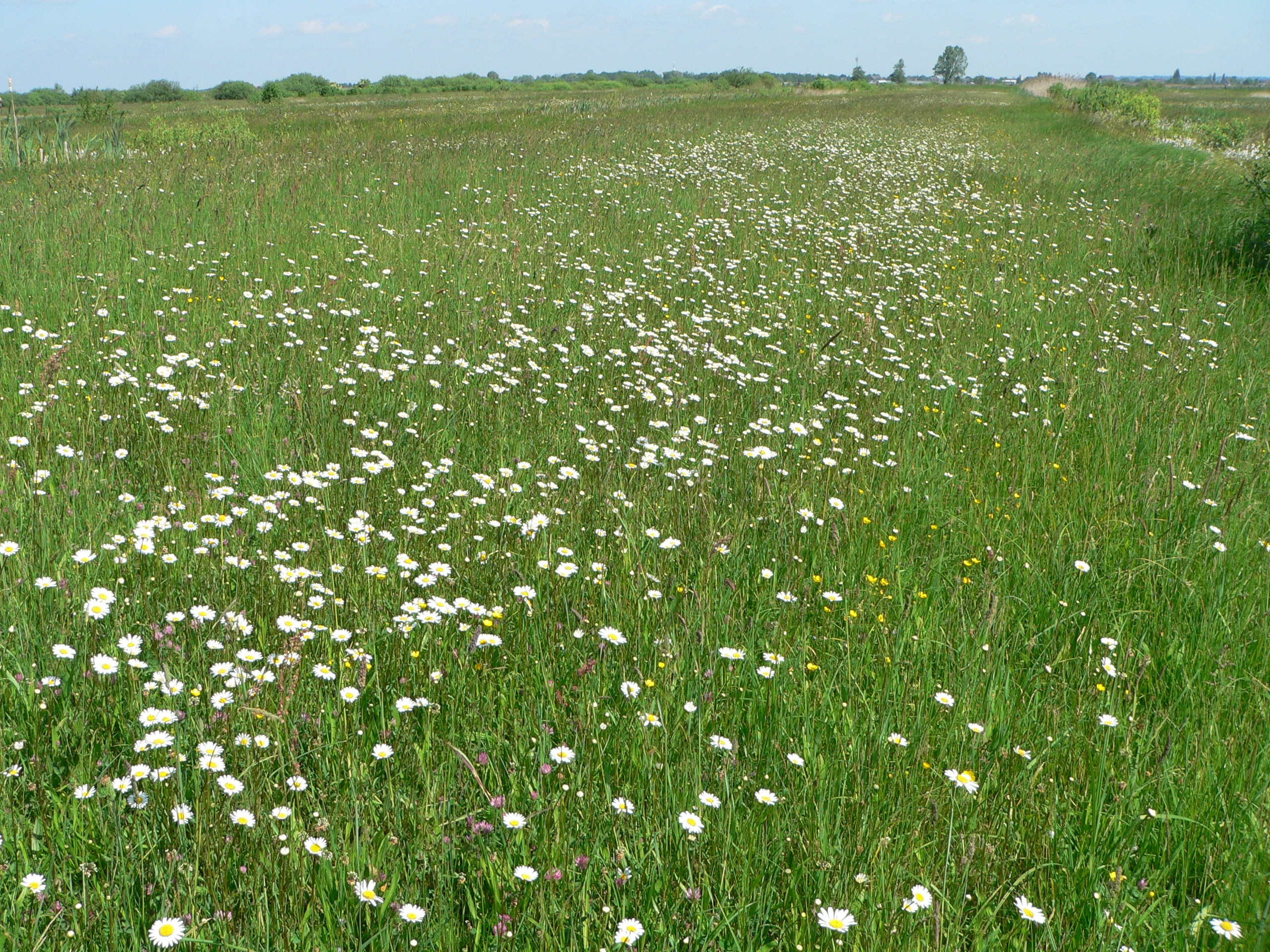 Artenreiche Mähwiese am Marschbahndamm.